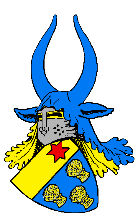 Stammwappen der von Buchenau, ein niederes Adelsgeschlecht, das seinen Namen nach dem gleichnamigen Ort Buchenau in der heutigen Gemeinde Dautphetal in Mittelhessen führte.